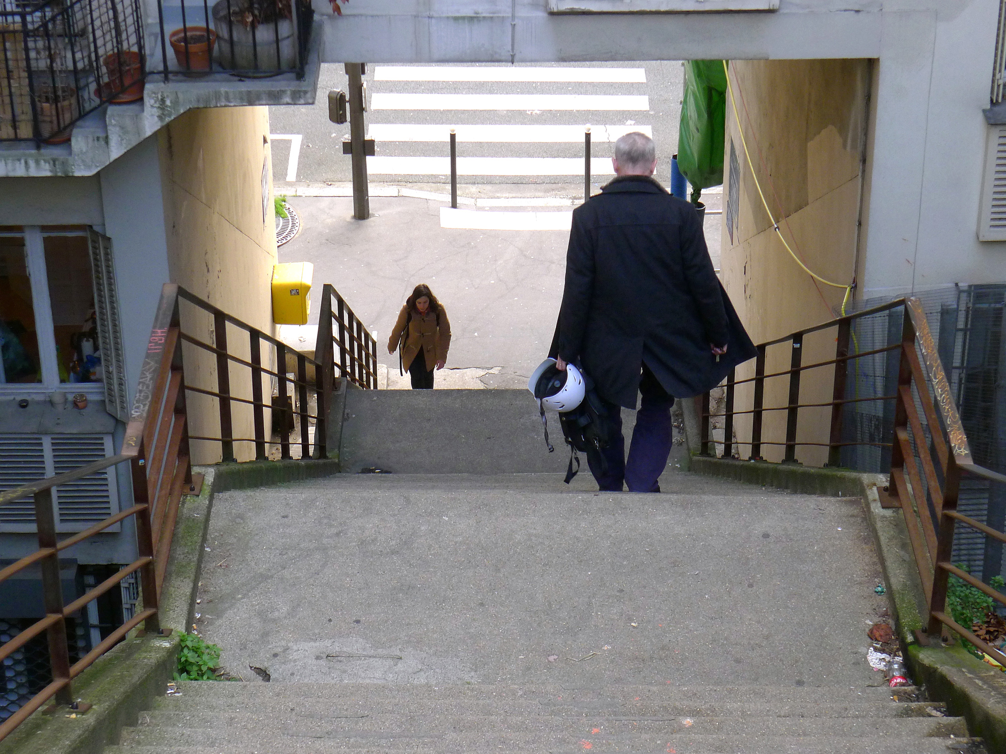 Escalier entre la butte Bergeyre et l'avenue Simon-Bolivar (lieu d'un célèbre cliché du photographe Willy Ronis) - Paris XIX